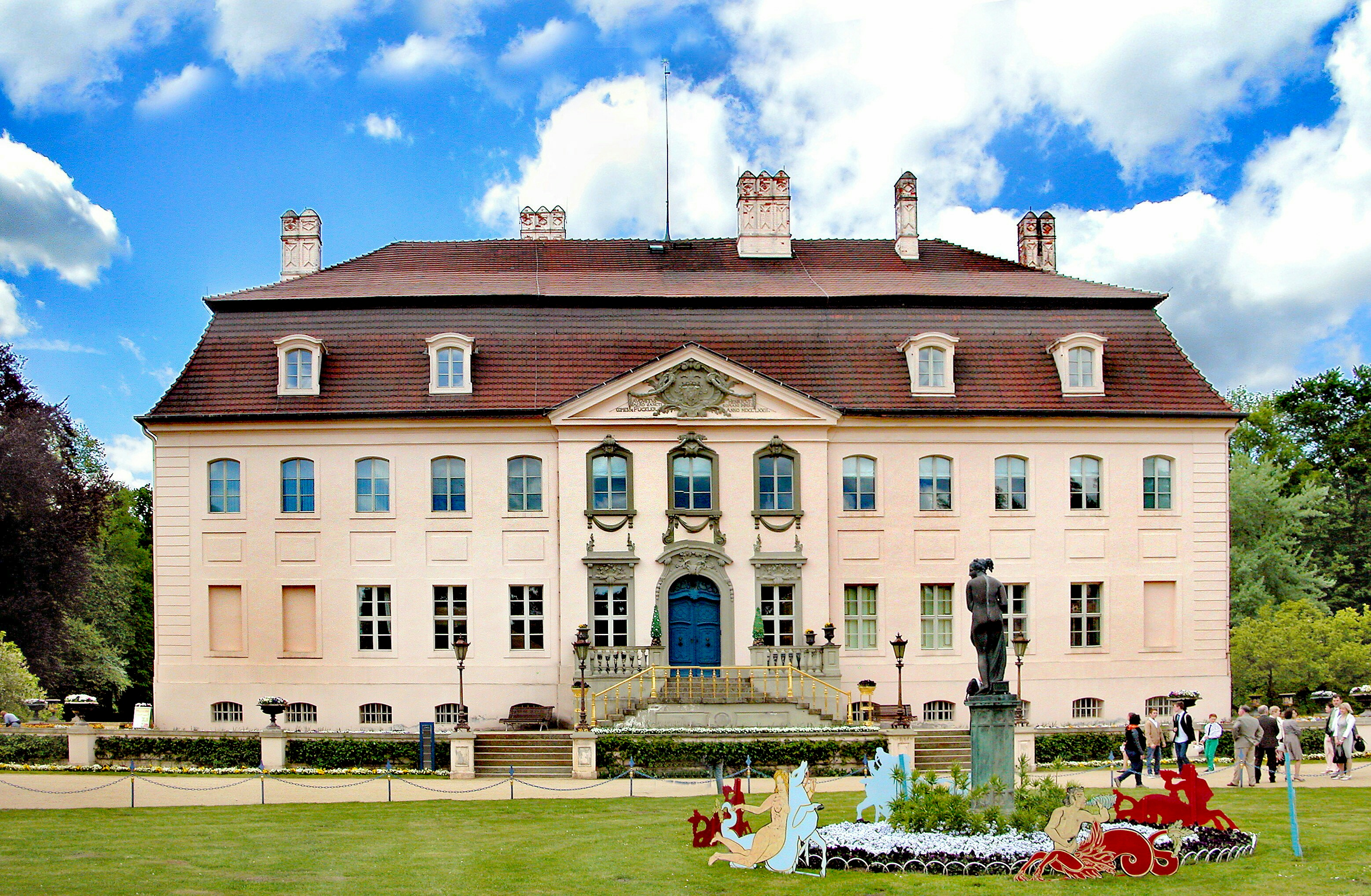 13.05.2015 03042 Branitz (zu Cottbus): Fürst-Pückler-Park Branitz: Schloß von Osten. Die Herrschaft Branitz gelangte 1696 in den Besitz der Grafenfamilie Pückler. 1846 bis 1871 legte Hermann Fürst Pückler-Muskau den Landschaftspark an. Das Schloß Branitz wurde 1772 nach Entwurf von Gottfried Semper errichtet. 1850 erfolgte ein Umbau. 1945 enteignet. In der DDR Bezirksmuseum. Die museale Nutzung blieb bis heute erhalten. Seit 1995 wird der Innenpark mit Pleasureground und Schloß von der kommunalen Stiftung Fürst-Pückler-Museum Park und Schloß Branitz verwaltet und gepflegt. [DSCN5614+5615.JPG]20150513315MDR.JPG(c)Blobelt